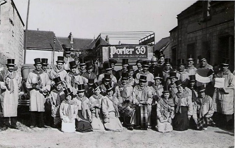 Les bigophonistes de la Commune libre de Persan, en région parisienne.